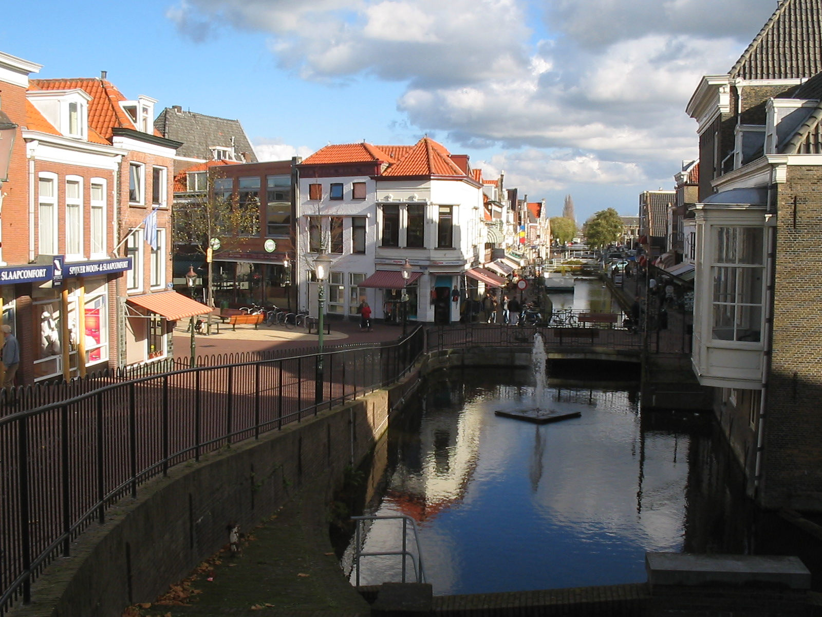 Wip/Zuidvliet, Maassluis (centrum), november 2005